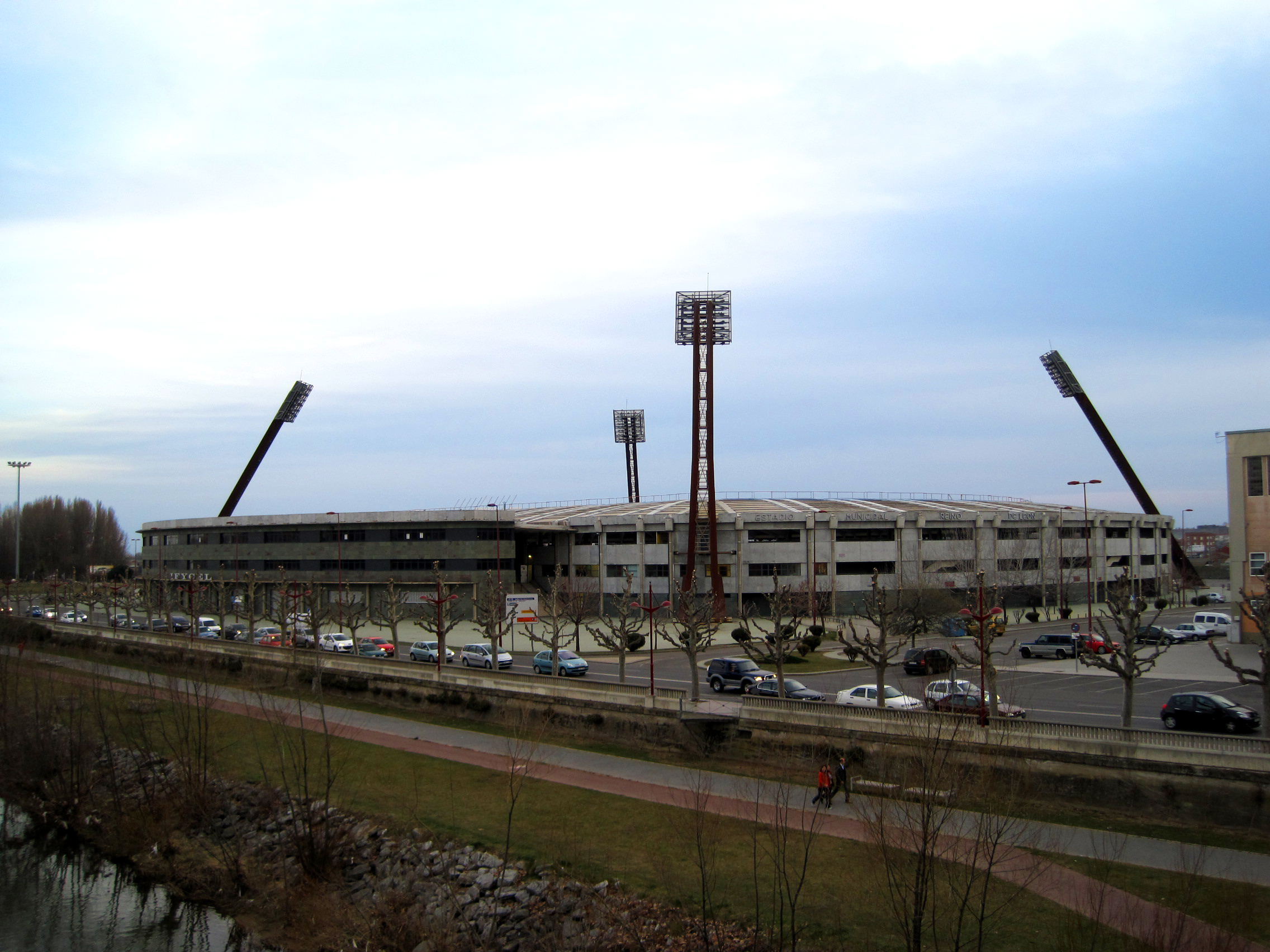 Vista externa del estadio municipal Reino de León, León (España).